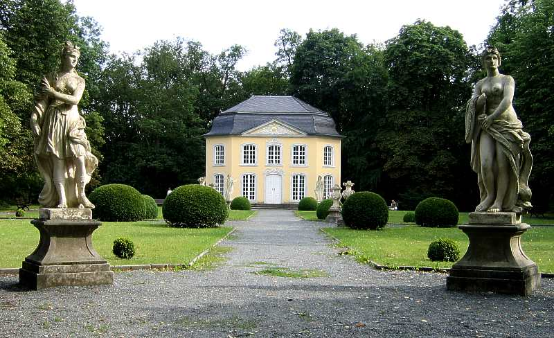 Sophienpark und Sophienhaus auf Schloss Burgk - Quermania - fotografiert im Sommer 2005